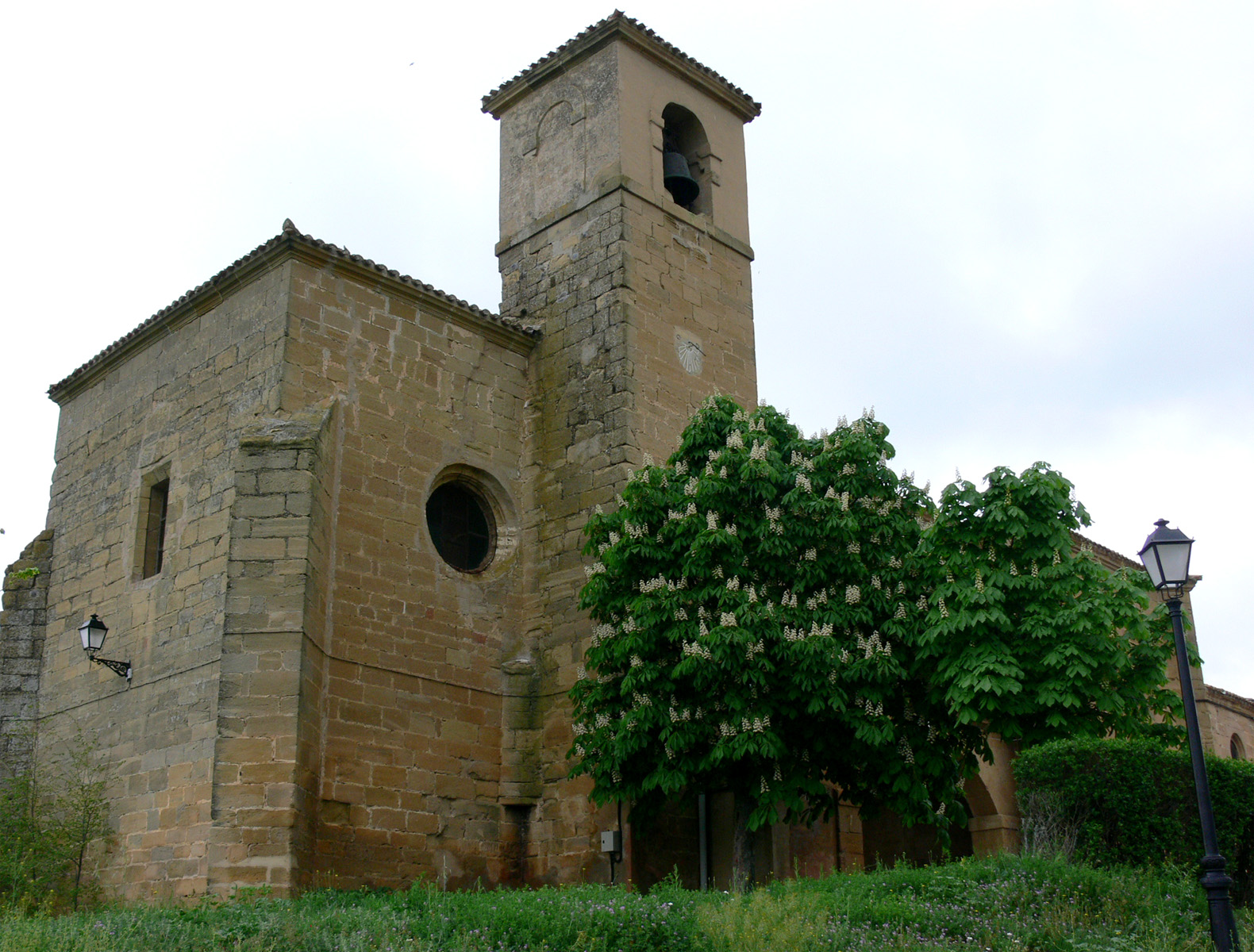 Iglesia de San Pablo en San Torcuato (La Rioja - España)